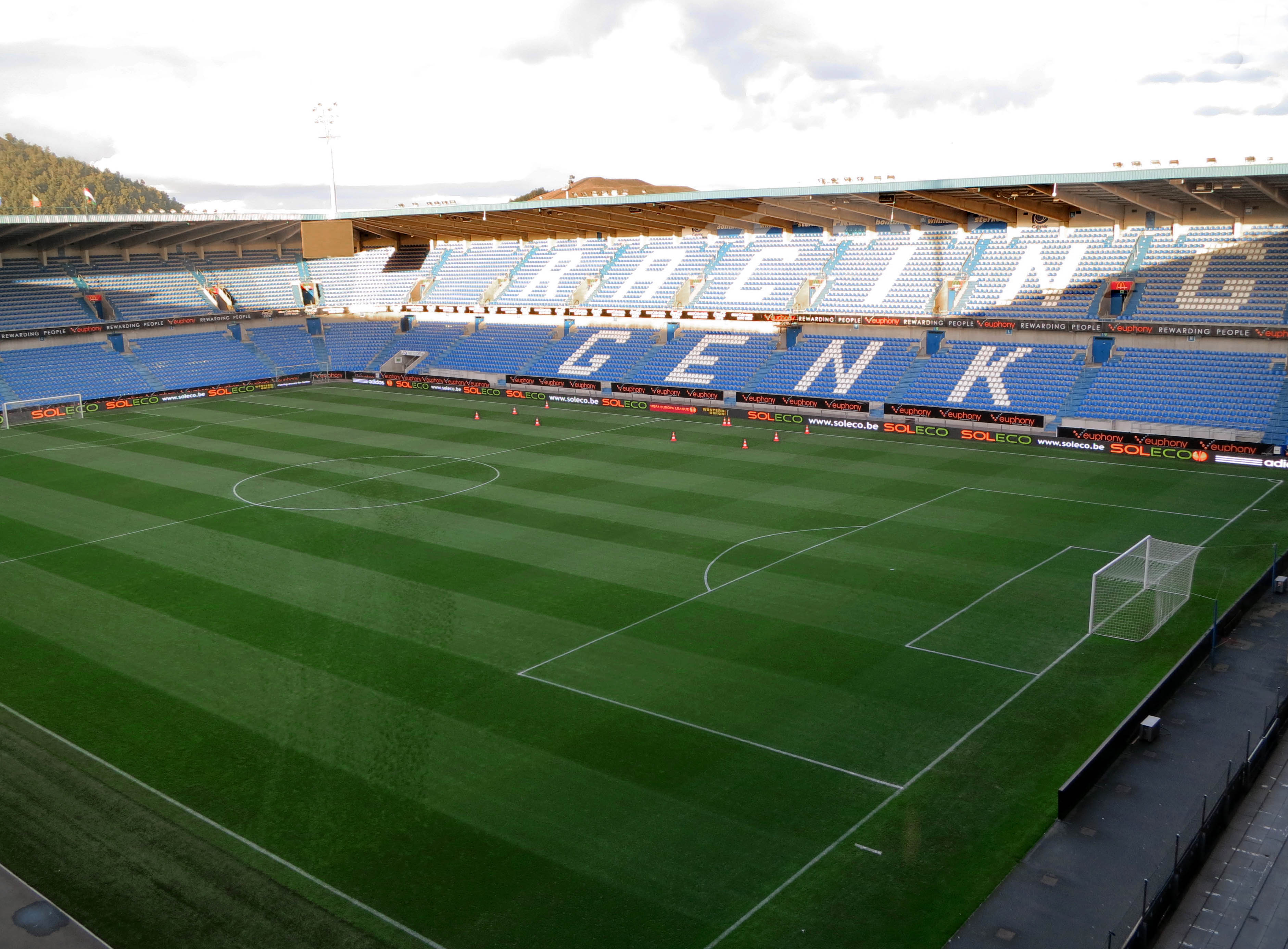 Cristal Arena Stadionplein Genk